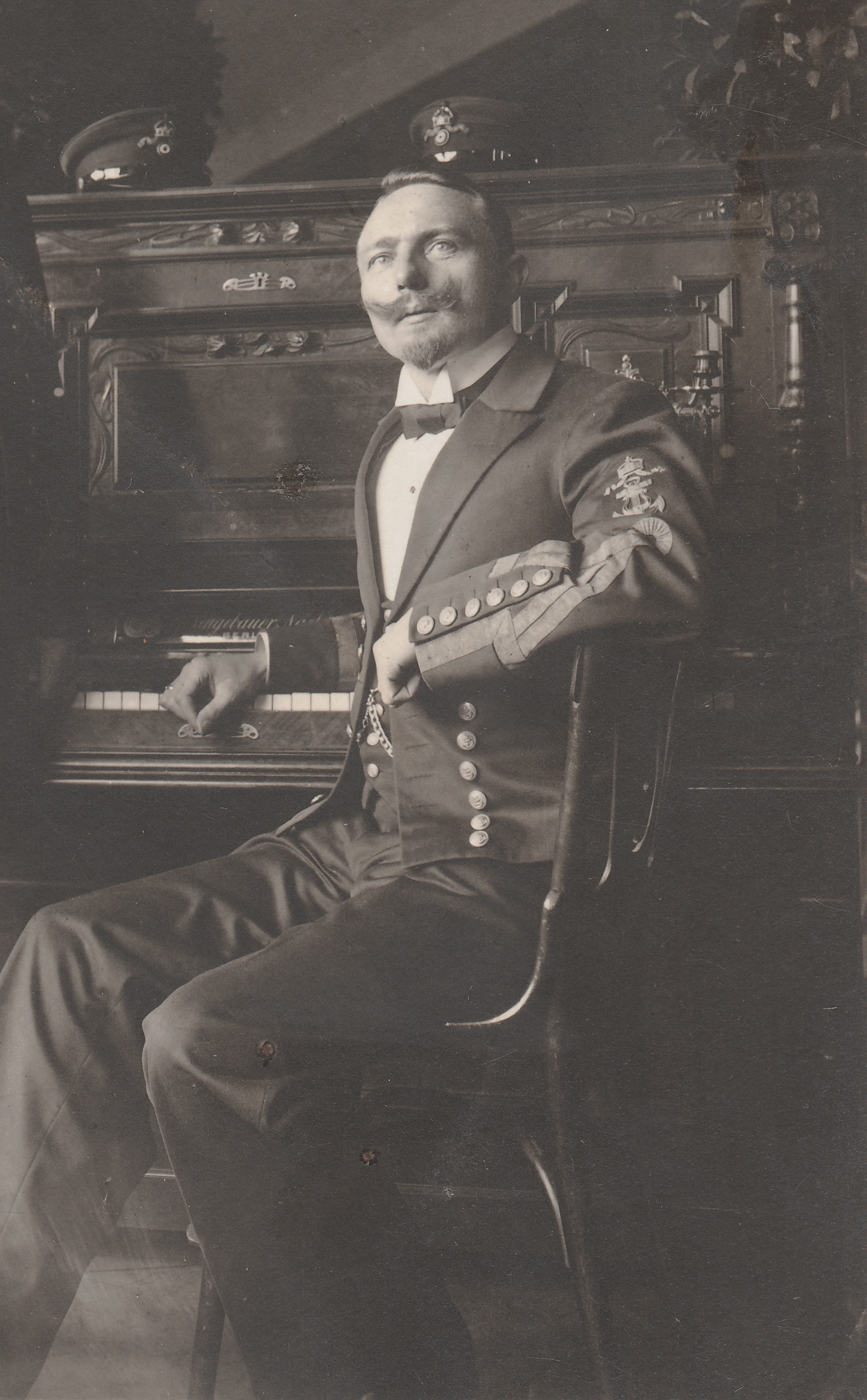 Theodor Krieghoff beim Komponieren am Piano